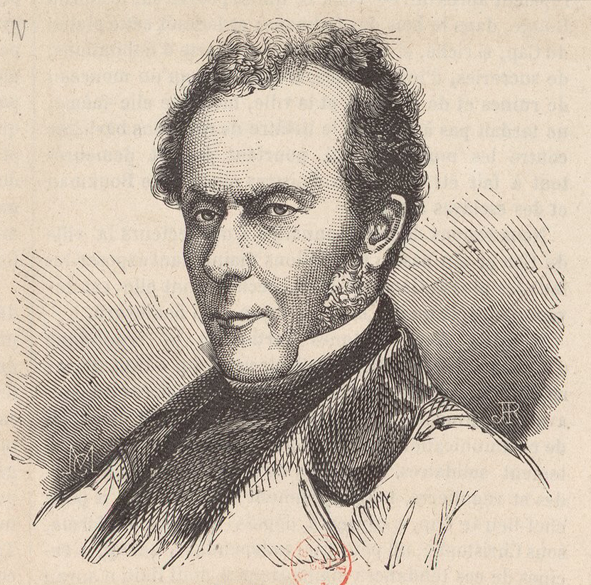 Ardouin, Beaubrun (1796-1865) -- Portraits (circa 1865)